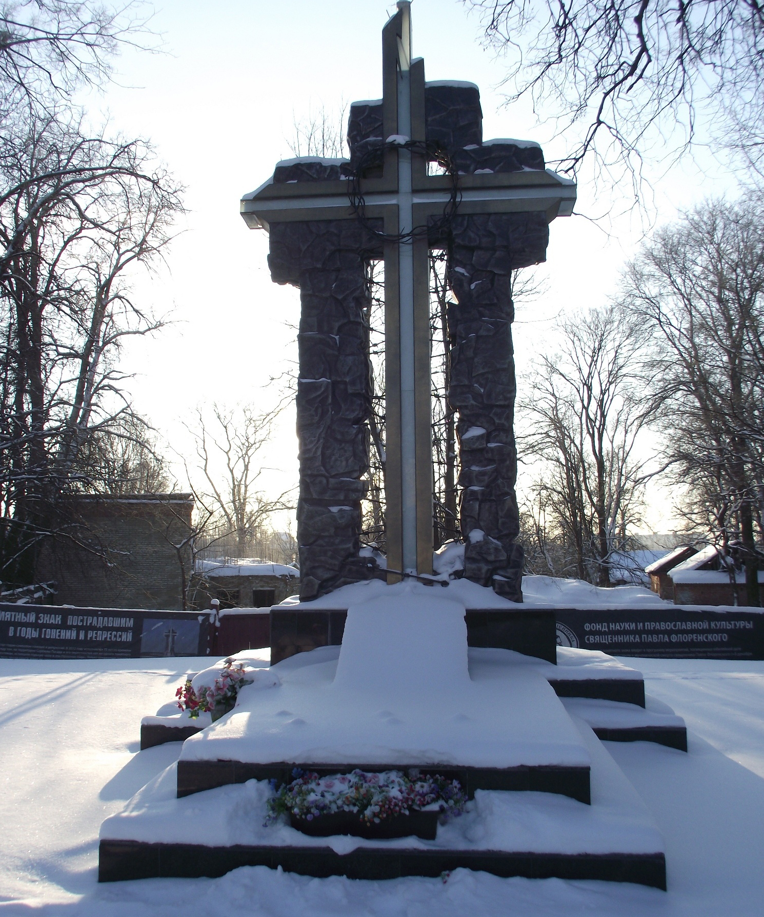 памятный знак "Пострадавшим за Христа в годы гонений и репрессий" приурочено к юбилейной дате - 75-летию со дня расстрела и мученической смерти священника Павла Флоренского